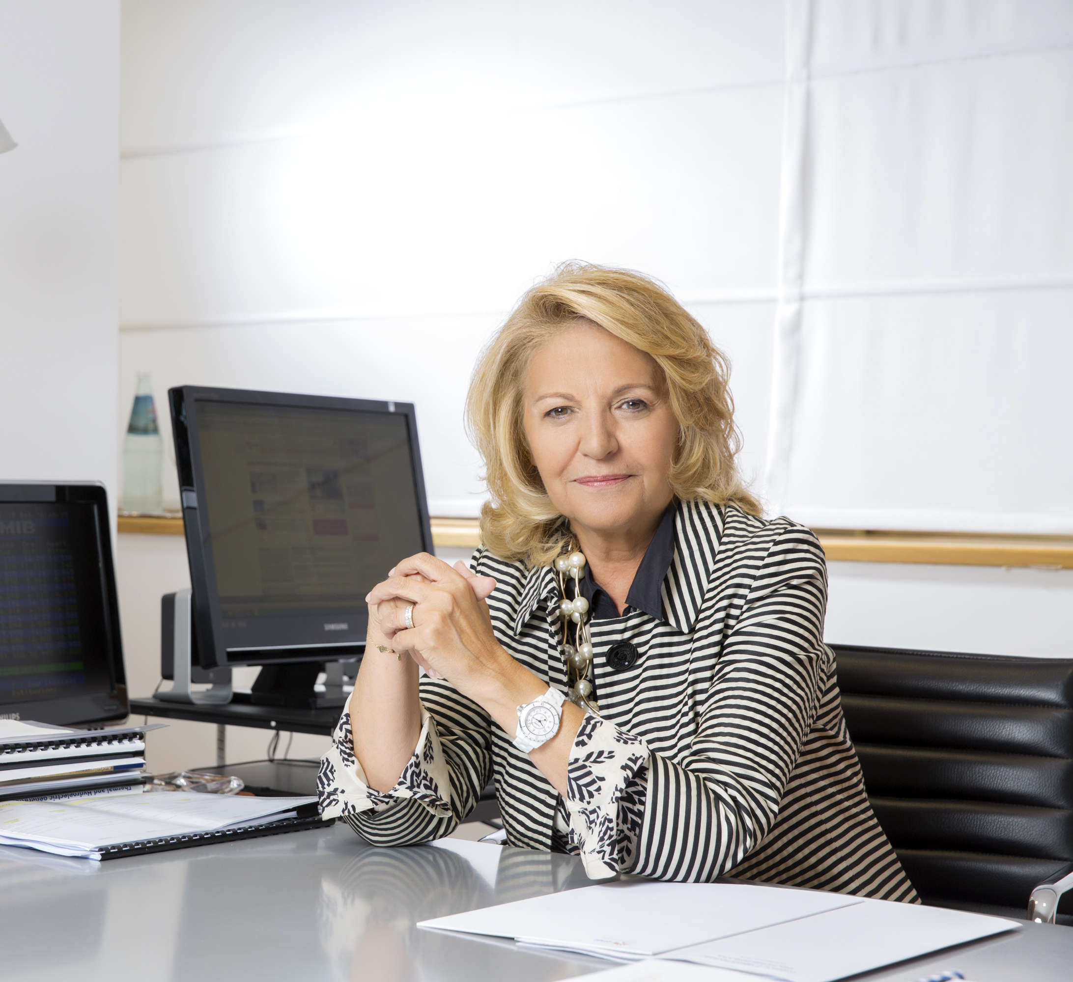 Maria Patrizia Grieco, Presidente di Enel